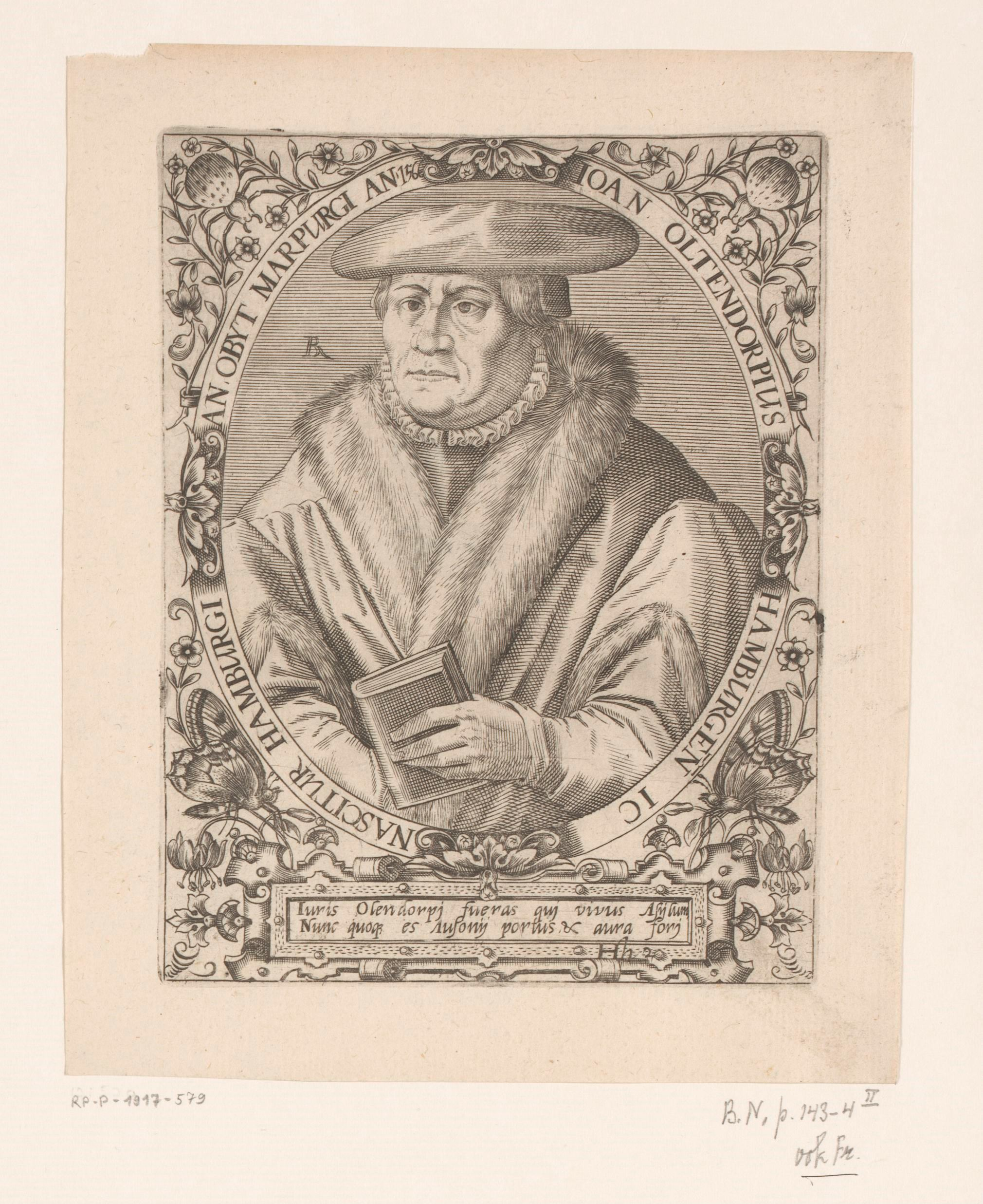 IdentificatieTitel(s): Portret van Johann OldendorpJoan Oltendorpius Hamburgen ic nascitur Hamburgi (...) (titel op object)Serie portretten van vijftiende- en zestiende-eeuwse geleerden (serietitel)Objecttype: prent Objectnummer: RP-P-1917-579Catalogusreferentie: LeBlanc 140Opschriften / Merken: verzamelaarsmerk, verso, gestempeld: Lugt 2228VervaardigingVervaardiger: prentmaker: Robert Boissard (vermeld op object)Plaats vervaardiging: FrankrijkDatering: 1597 - 1599Materiaal: papier Techniek: graveren (drukprocedé)Afmetingen: plaatrand: h 139 mm × b 107 mmToelichtingMogelijk prent uit: Boissard, Jean-Jacques; Bry, Theodoor de; e.a. Bibliotheca sive thesaurus virtutis et gloriae in quo continentur illustrium eruditione et doctrina virorum effigies et vitae (...). Frankfurt: Guilielmi Fitzeri, 1628.OnderwerpWat: historical personsbookspidersinsects: butterflyWie: Johann OldendorpVerwerving en rechtenVerwerving: aankoop 1905Copyright: Publiek domein